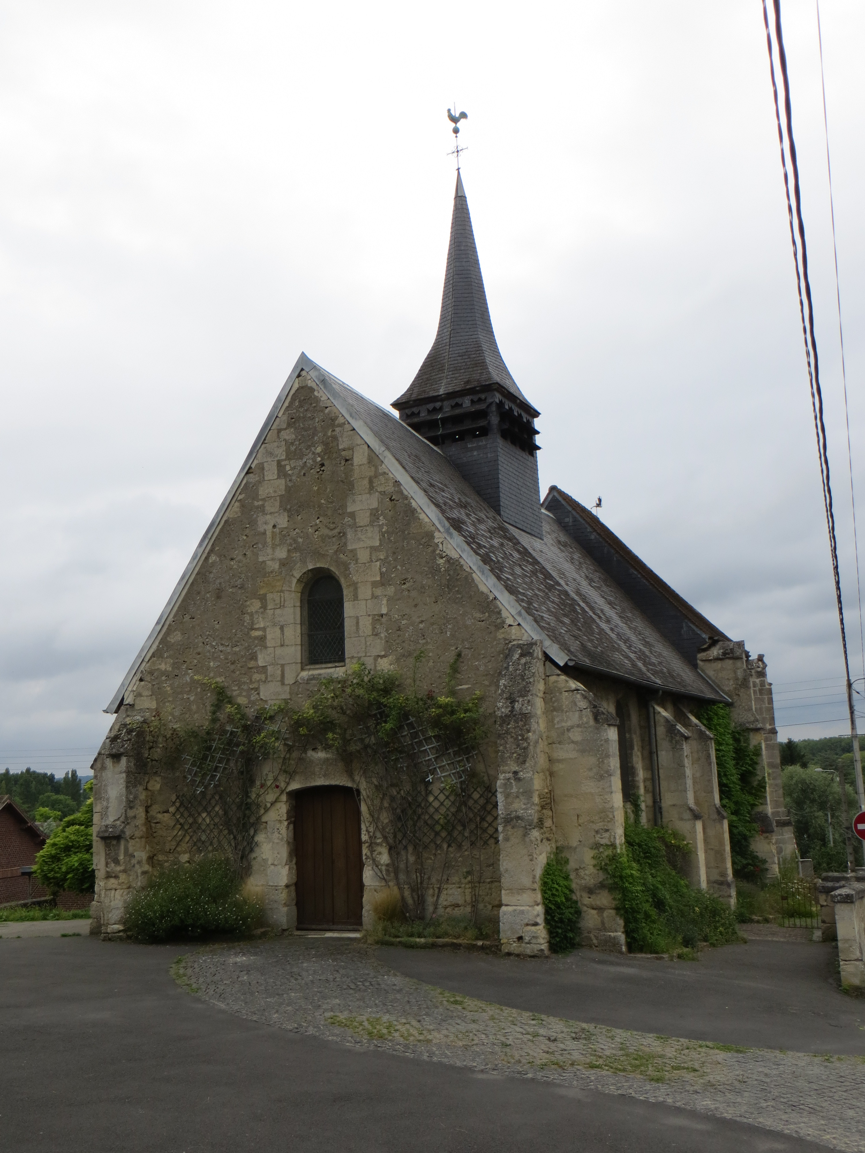 Vue générale de l'église